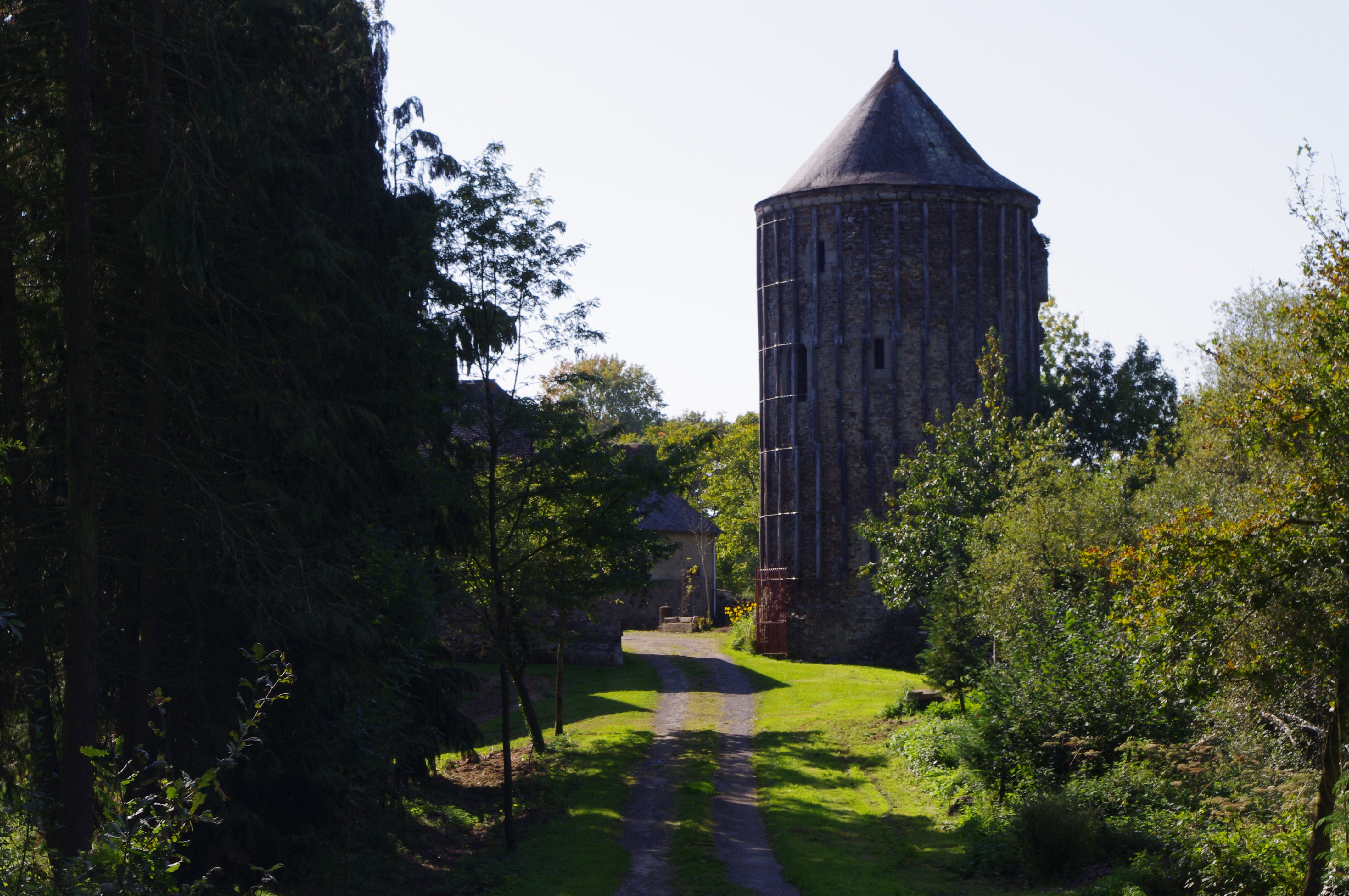 Donjon du château de Montauban-de-Bretagne (35).